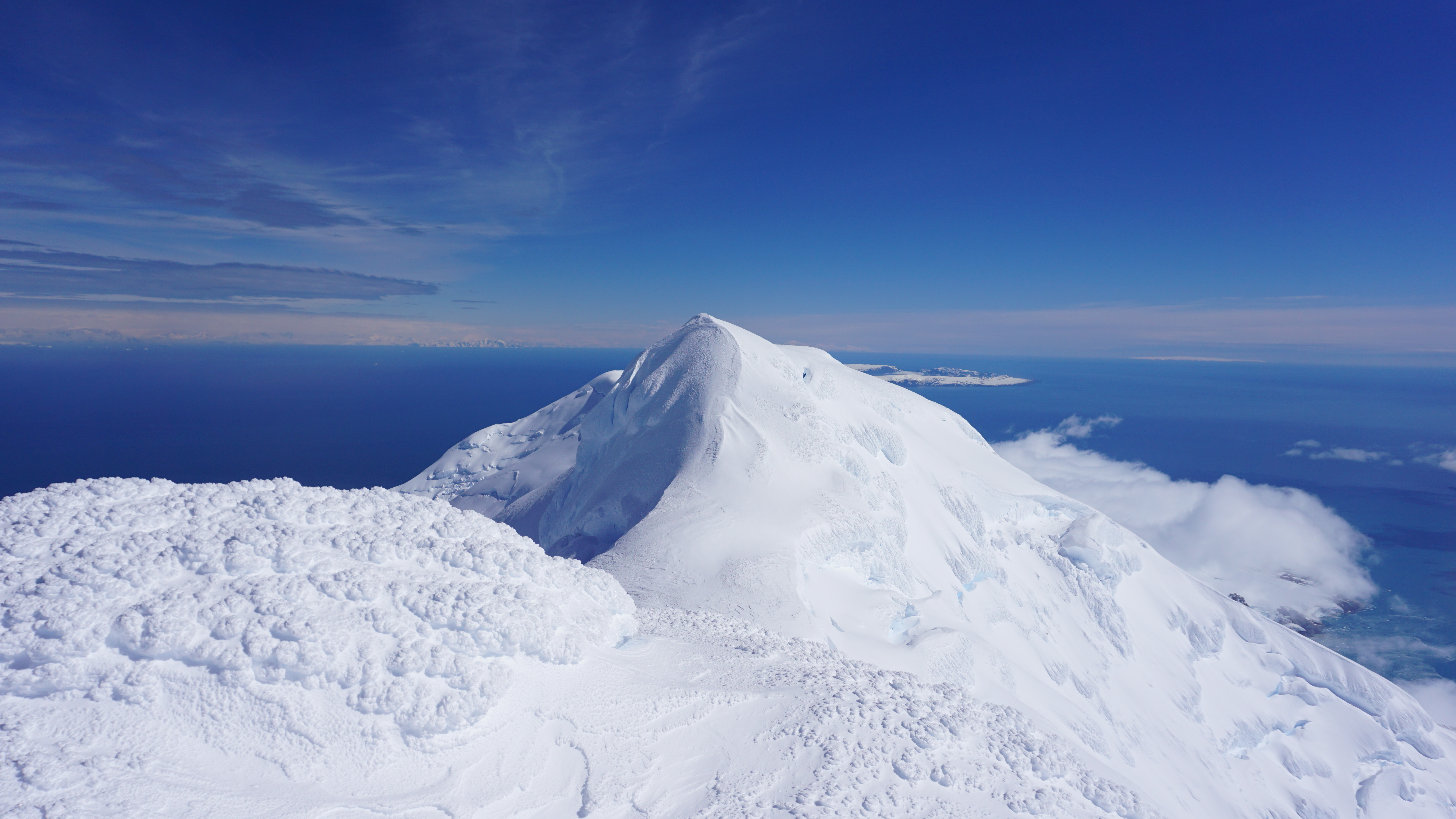 Връх Св. Борис. Поглед от връх Фризланд